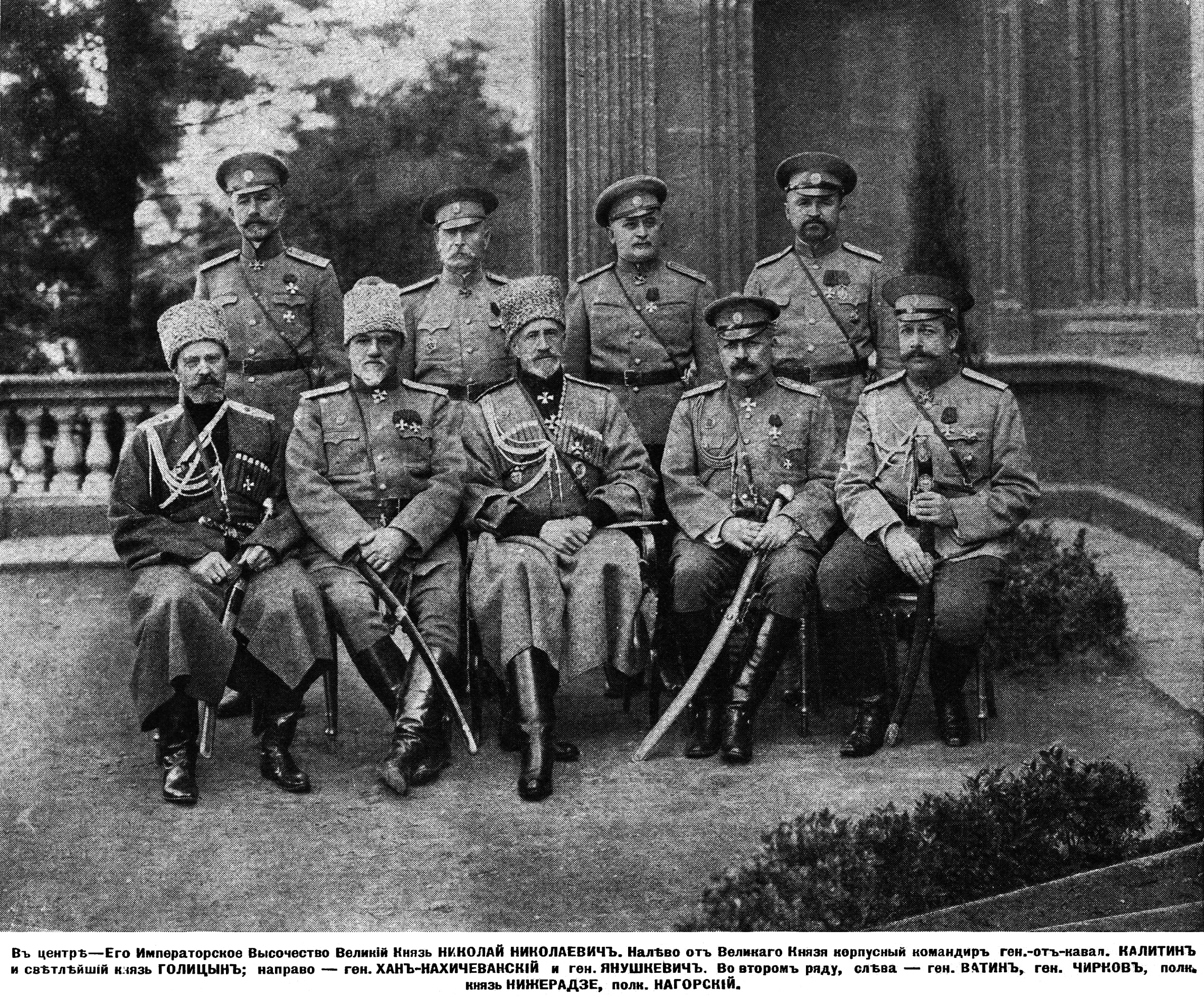 Георгиевская Дума Кавказского фронта.